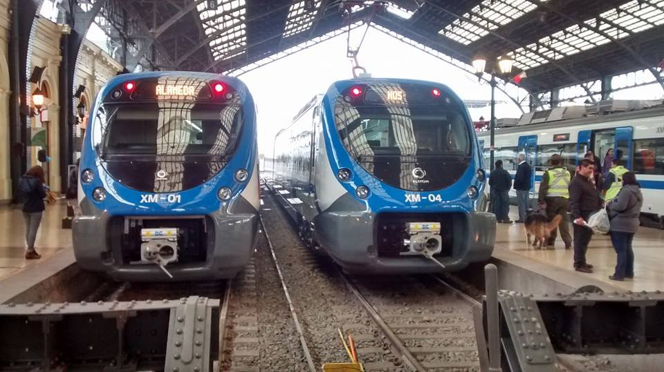 XM-01 y XM-04 en Est Alameda